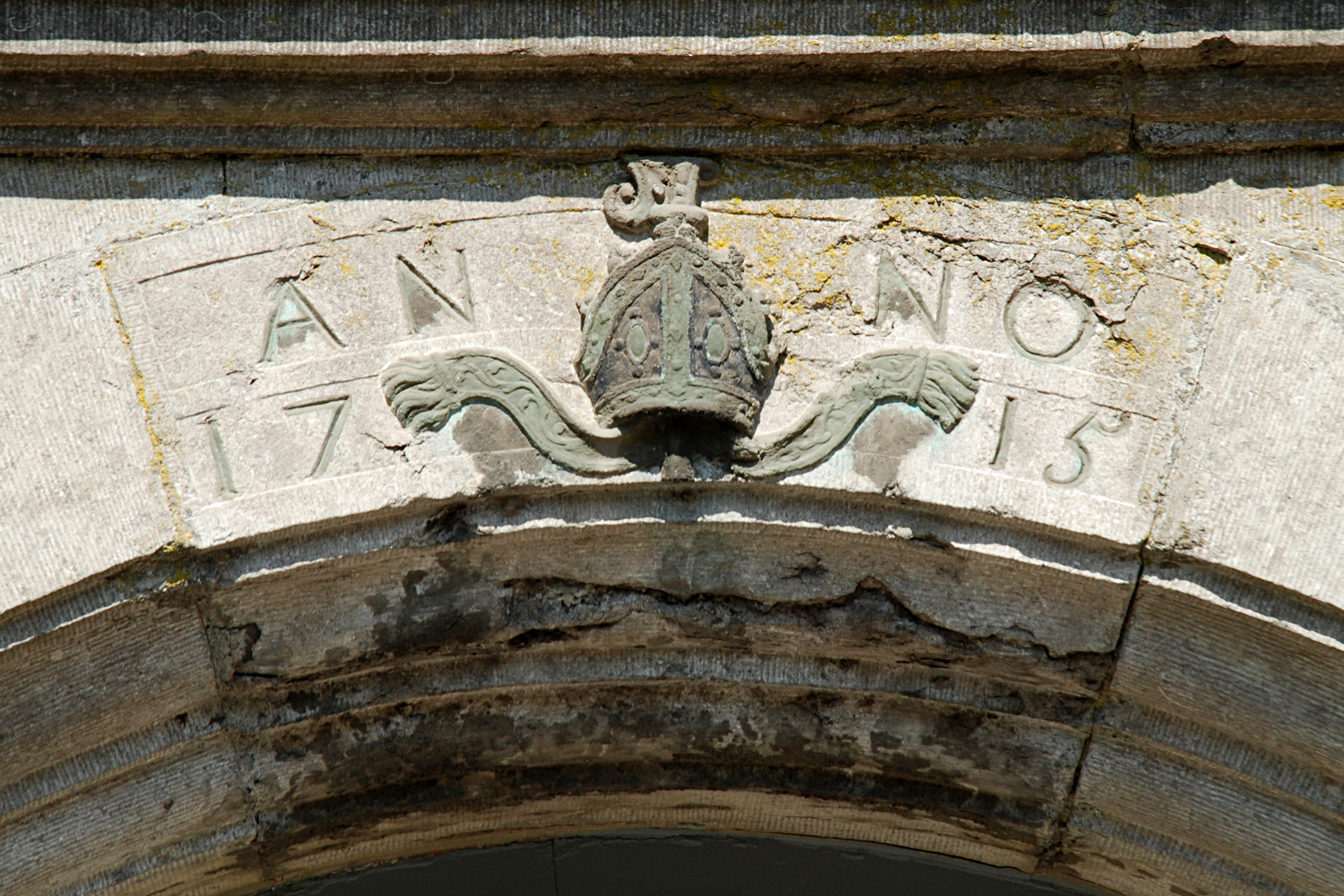 Belgique - Brabant wallon - Villers-la-Ville - Chapelle Saint-Bernard